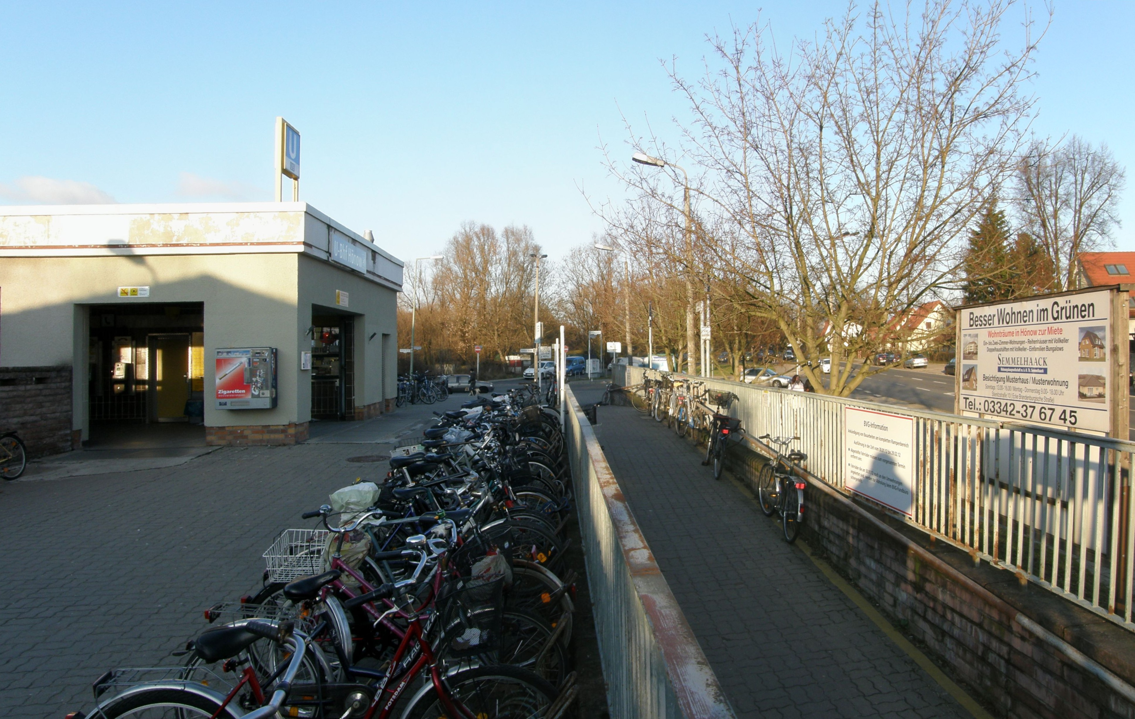 Berlin-Hellersdorf, Mahlsdorfer Str. im Bereich um den U-Bahnhof Hönow